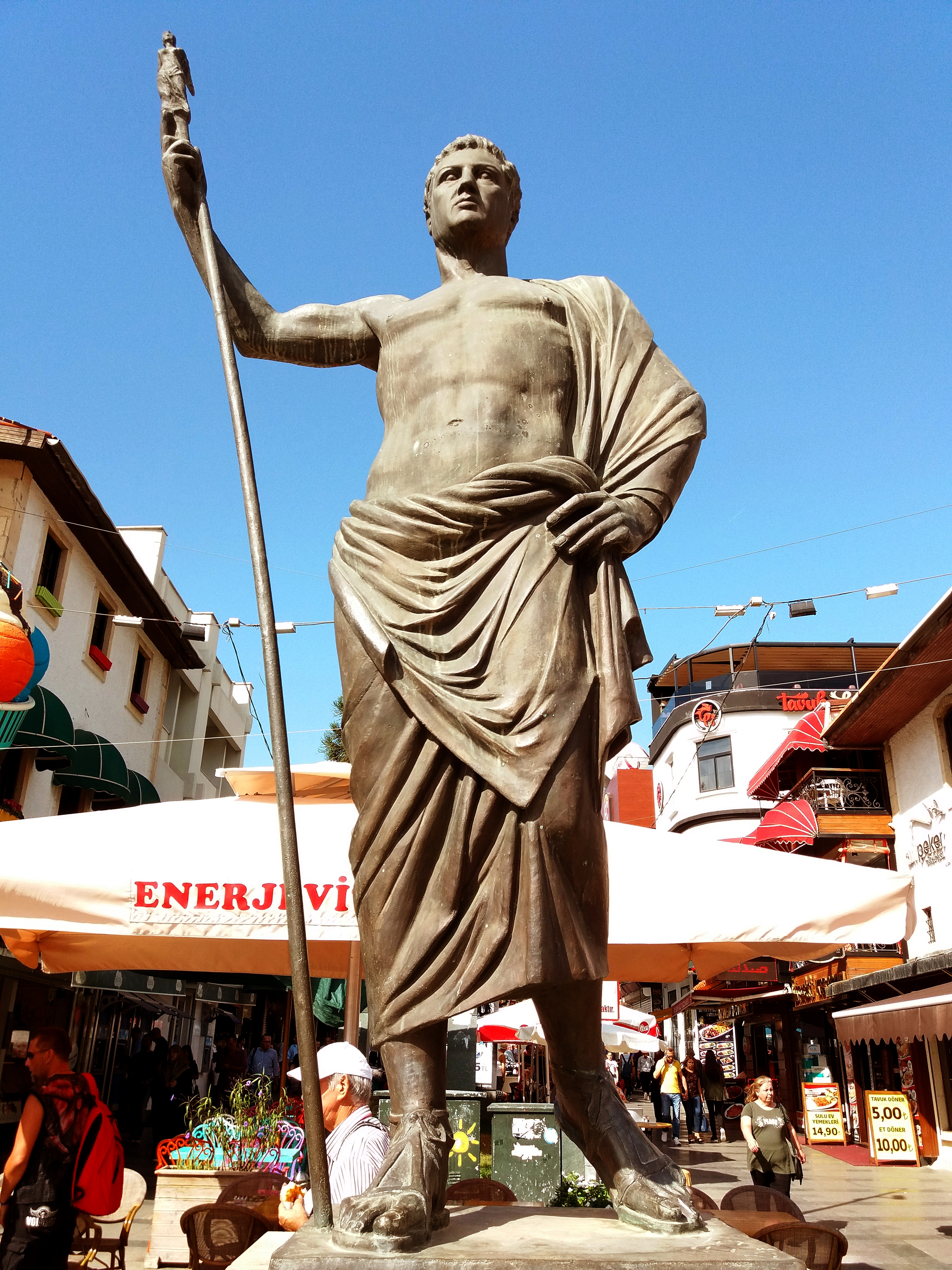 Attalus II Philadelphus. Antalya. Türkiye. 2018.